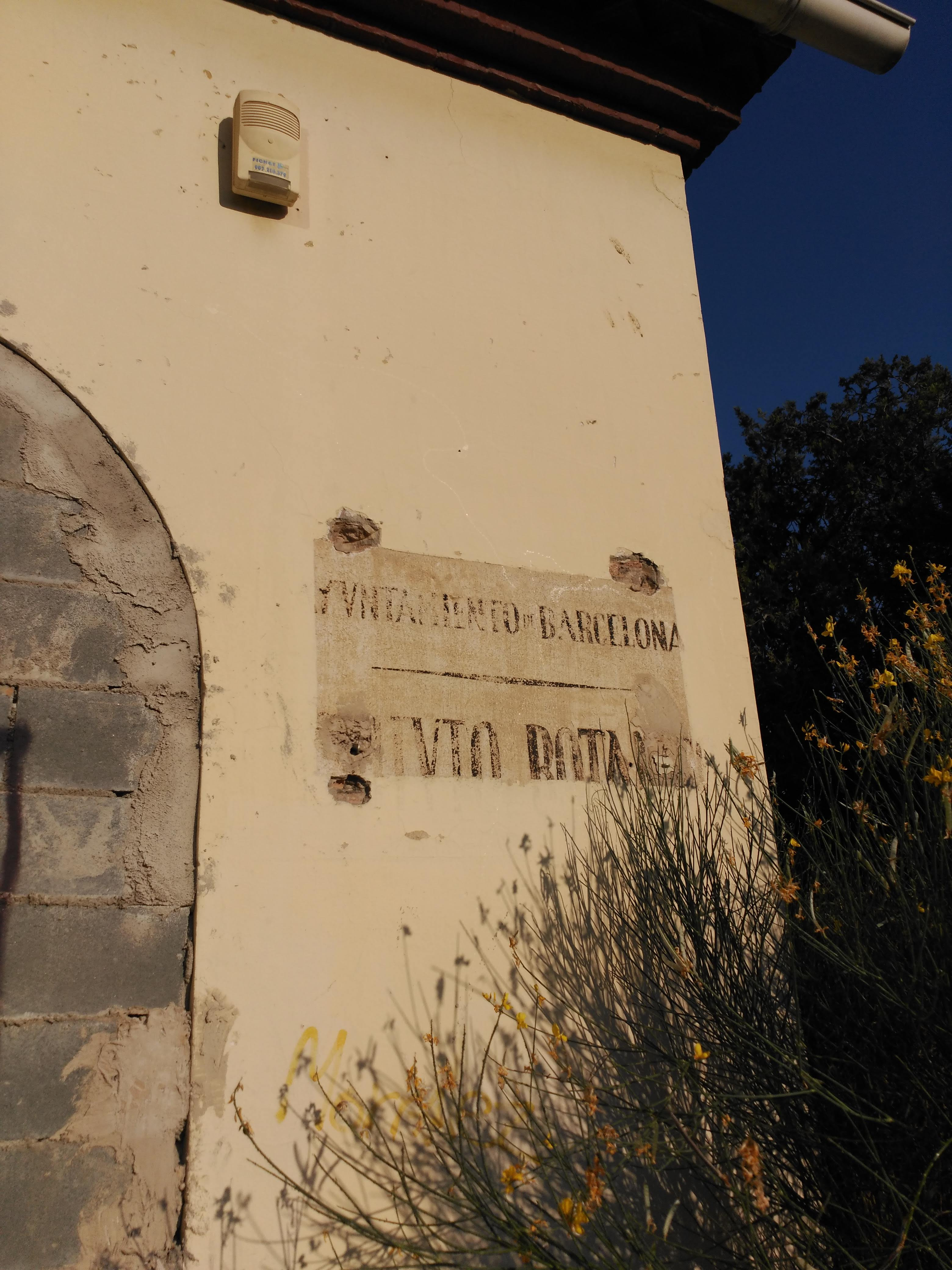 Detall de l'anunci que indicava l'accés a l'antic Institut Botànic de Barcelona